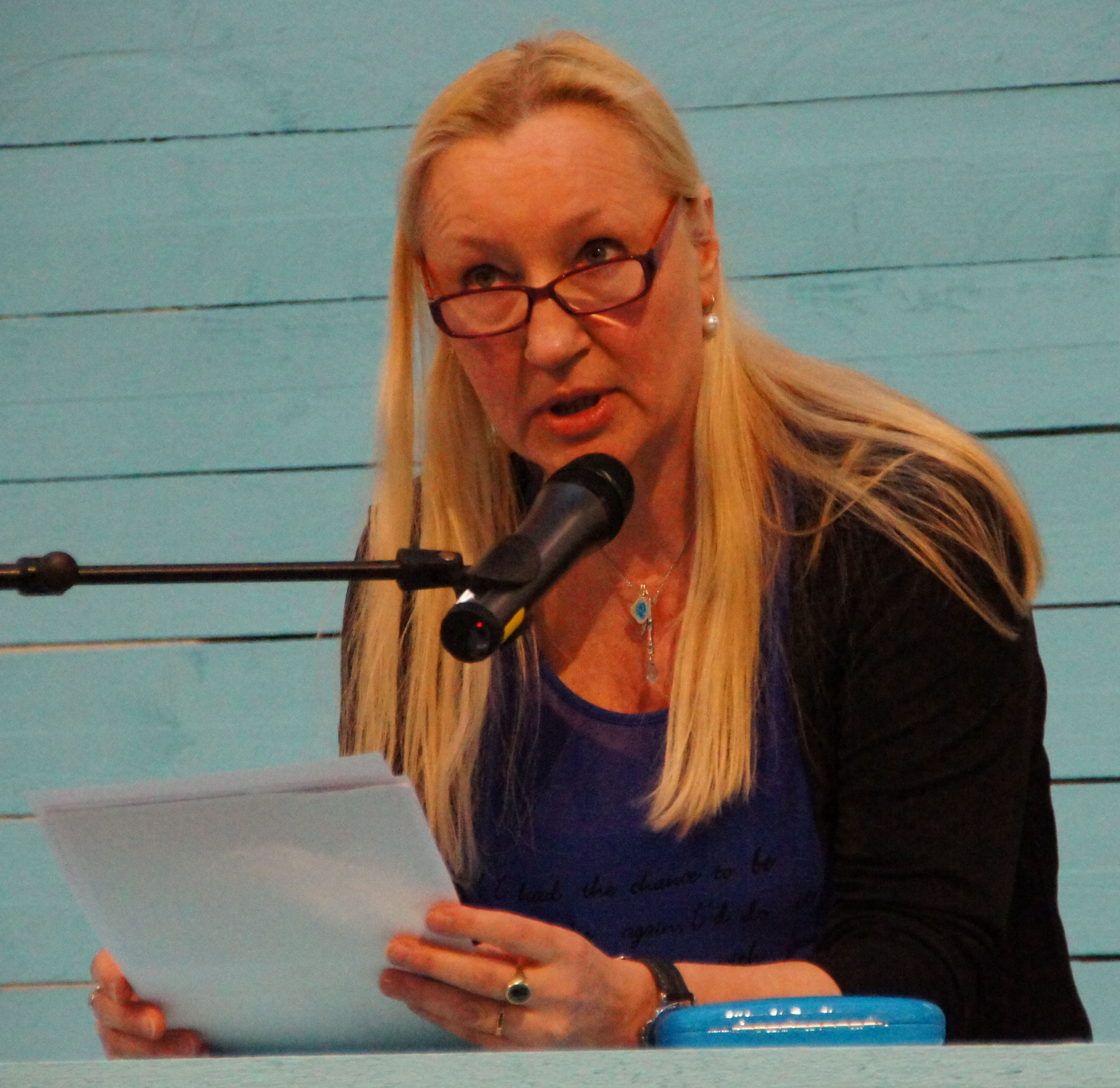 Unter dem Titel "Eine Versammlung kommt selten allein" lasen, anlässlich des 40. Jahrestages der Gründung, Lyriker und Lyrikerinnen der Grazer Autorinnen Autorenversammlung im "Salon für Kunstbuch im 21er Haus". Abgebildete Personen: S. Dateiname.